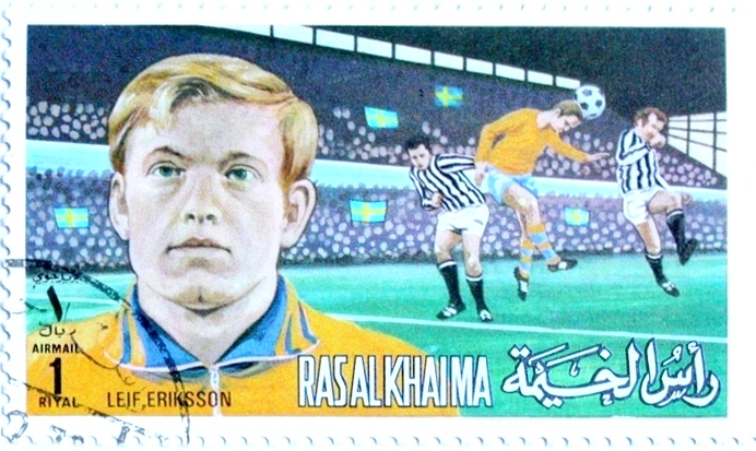 Leif Eriksson (footballer)